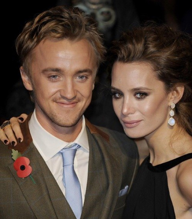 ハリーポッターと死の秘宝Part1 ロンドンワールドプレミアにて。 恋人のトムフェルトンと。